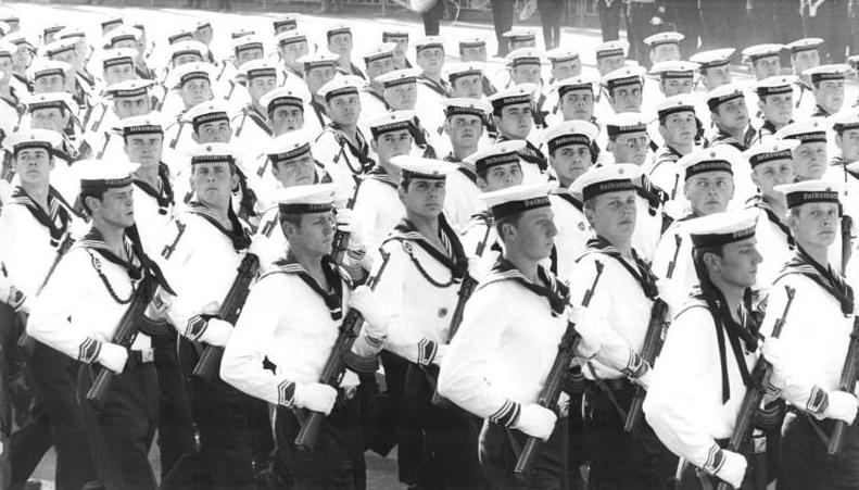 Berlin, 30. Jahrestag DDR-Gründung, Parade ADN-ZB Mittelstädt 7.10.79 Berlin: Ehrenparade Eine Ehrenparade der NVA zum 30. Jahrestag der DDR war am 7.10.79 in Berlin beeindruckender Auftakt des Jubiläumstages. - Den Abschluß der Fußtruppen bildeten ein Marschblock Offiziersschüler der Offiziershochschule der Volksmarine "Karl Liebknecht" und eine Ehrenformation Maatschüler der Flottenschule "Walter Steffens".